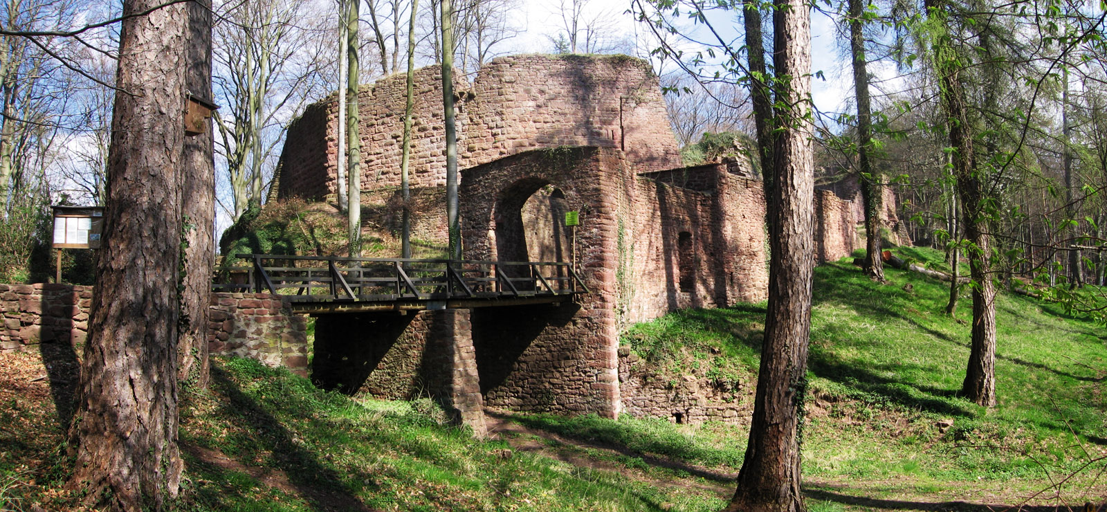 Ansicht der Burgruine Wildenstein